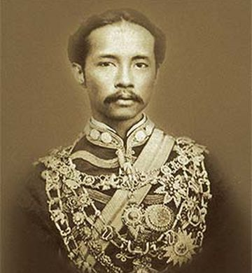 พระบาทสมเด็จพระจุลจอมเกล้าเจ้าอยู่หัวทรงเครื่องแบบนายทหารรักษาพระองค์ ยศคอลอเนล